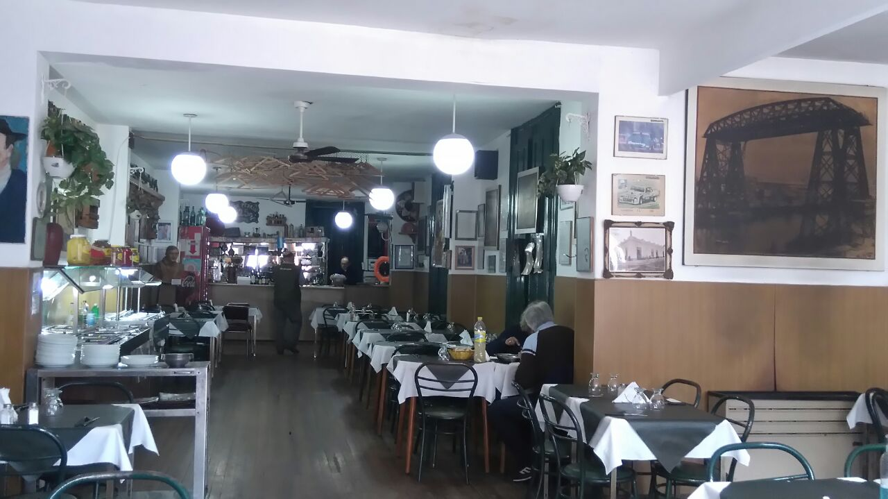 Pizzería que frecuentaba el artista Rubén Osvaldo Lago en la ciudad Chivilcoy